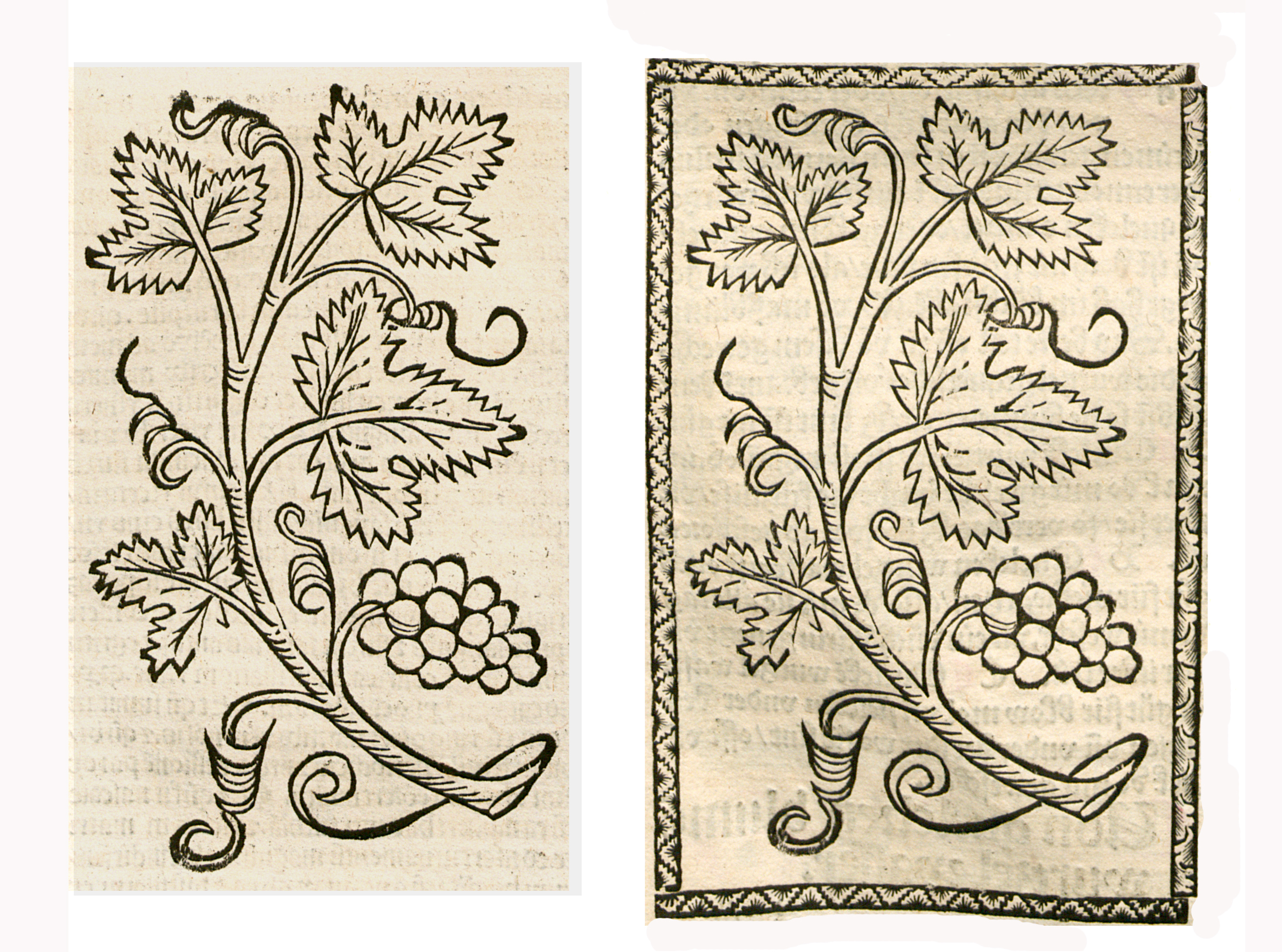 Abbildung von: Reben (Vitis vinifera)